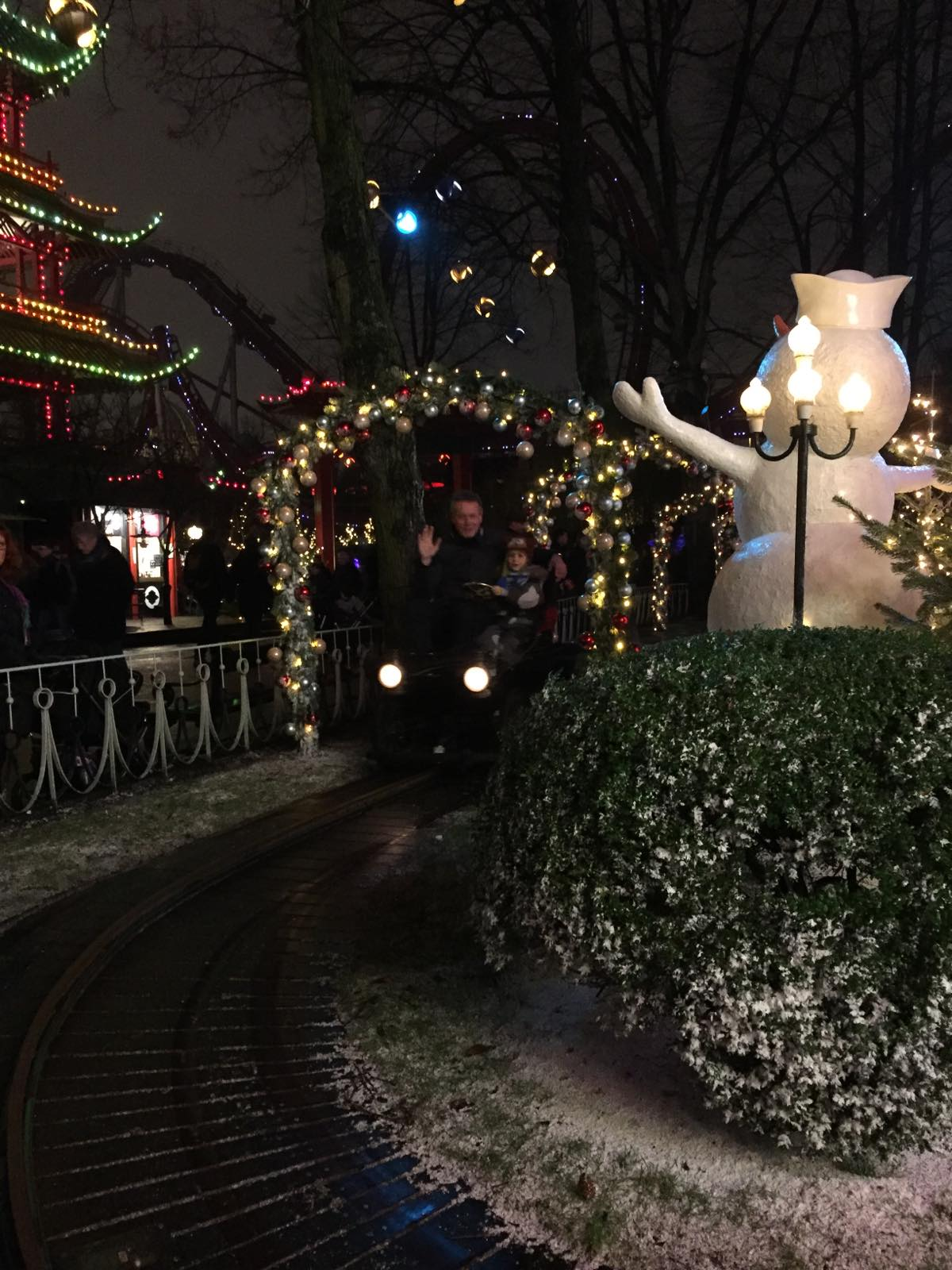 Дечије вожње